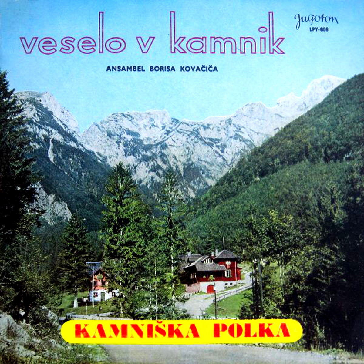 Ansambel Borisa Kovačiča - Veselo v Kamnik.